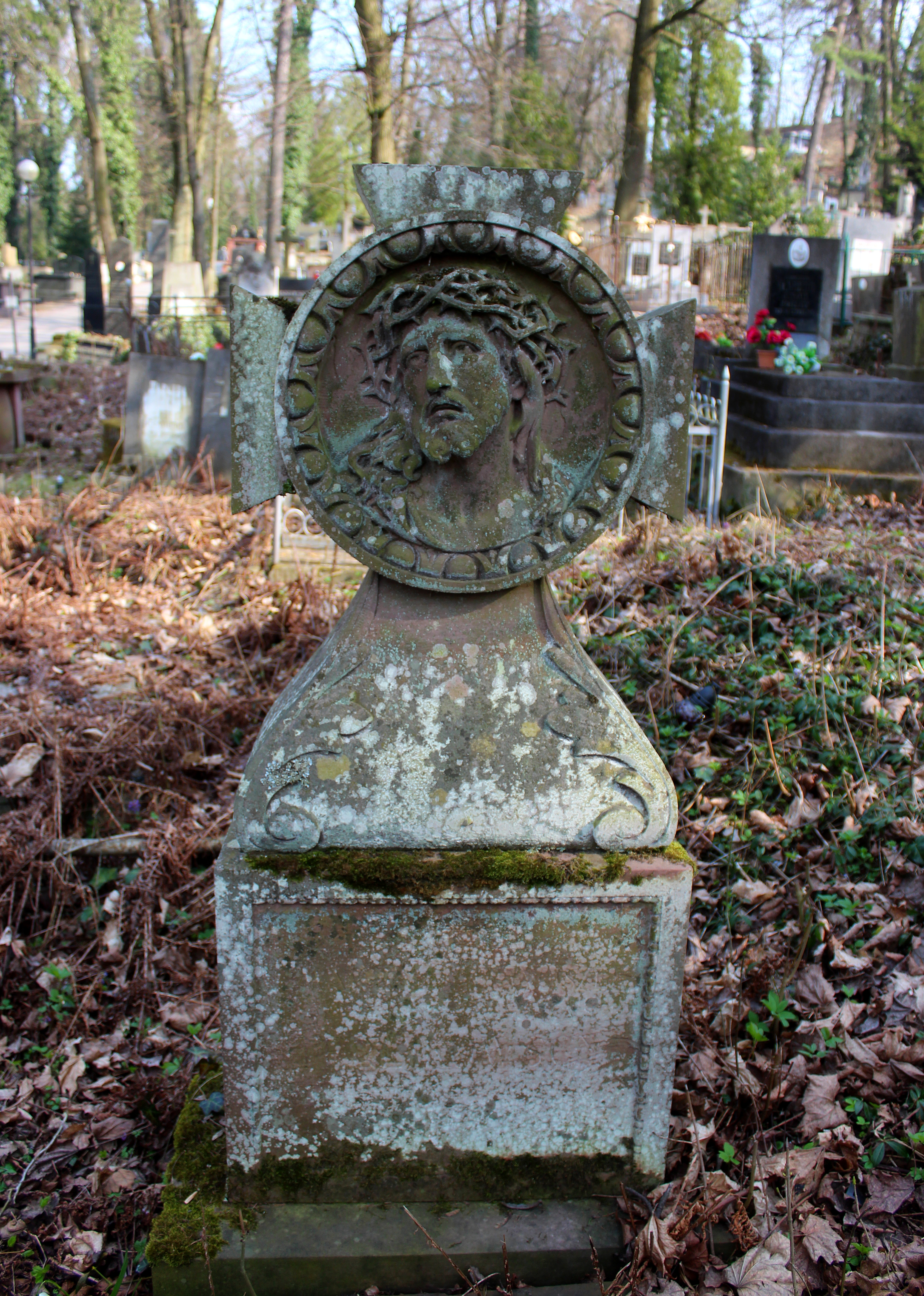 Пам'ятник на могилі Ф. Терліковського.Личаківський цвинтар , поле № 16.